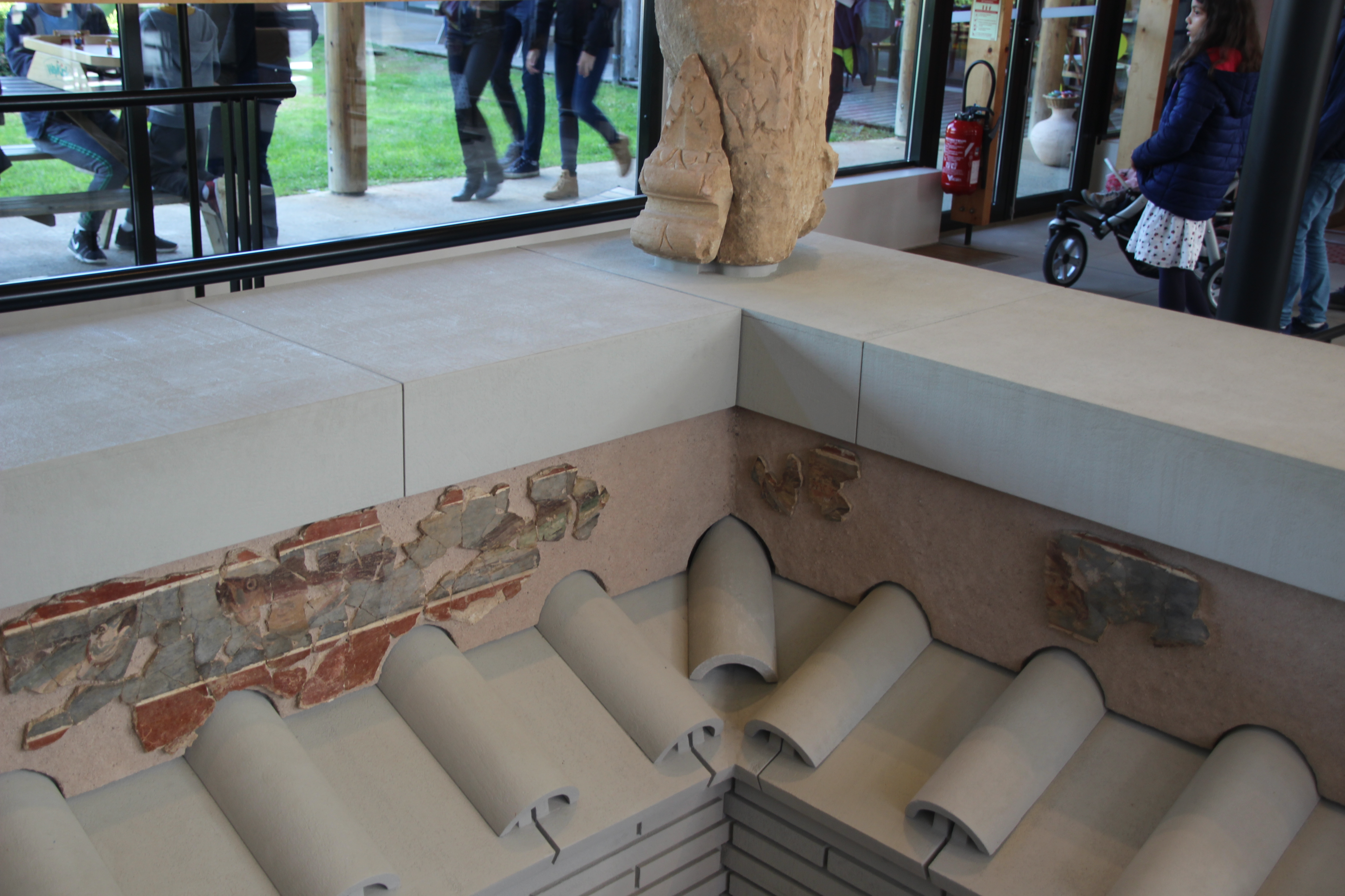 Fresque bassin maison au grand péristyle